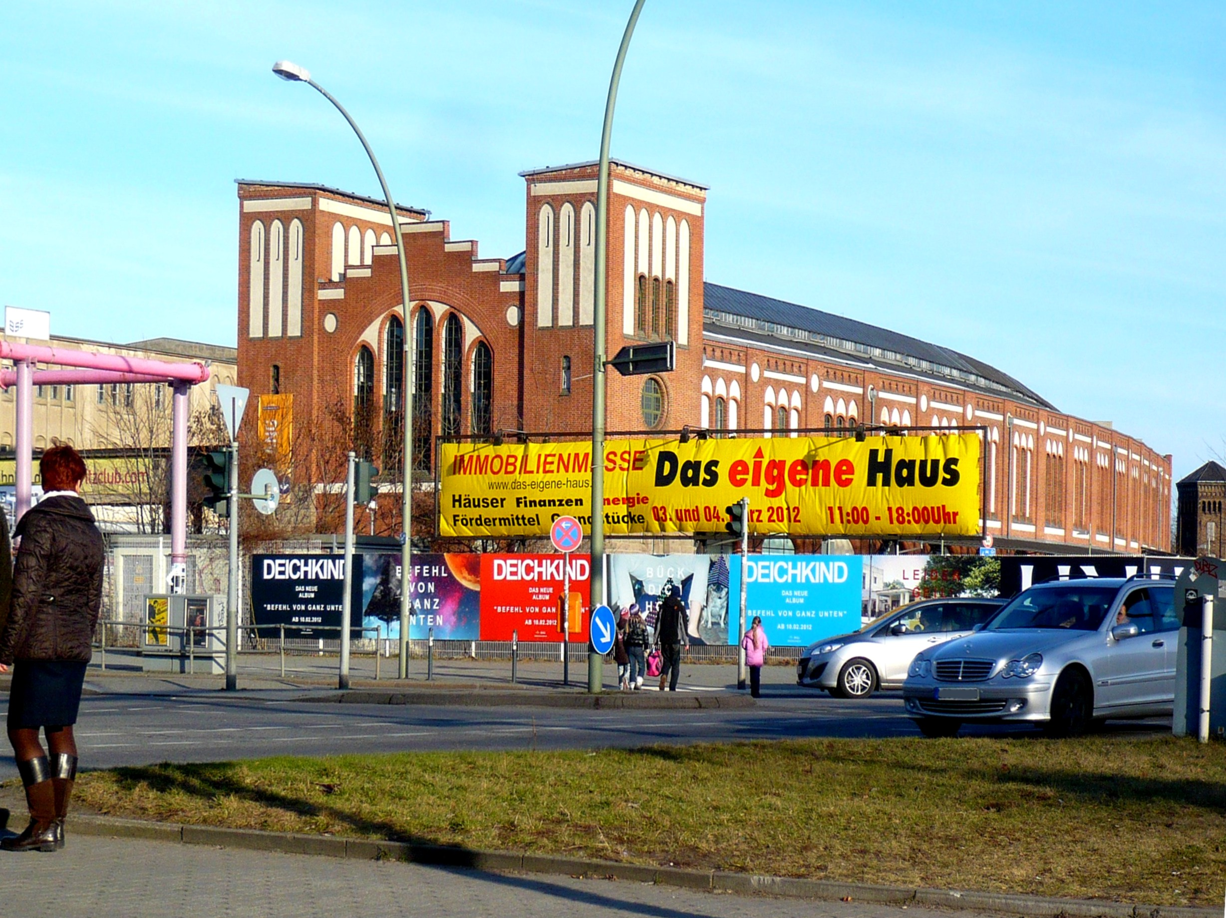 Berlin-Friedrichshain, eh. Postbahnhof am Stralauer Platz